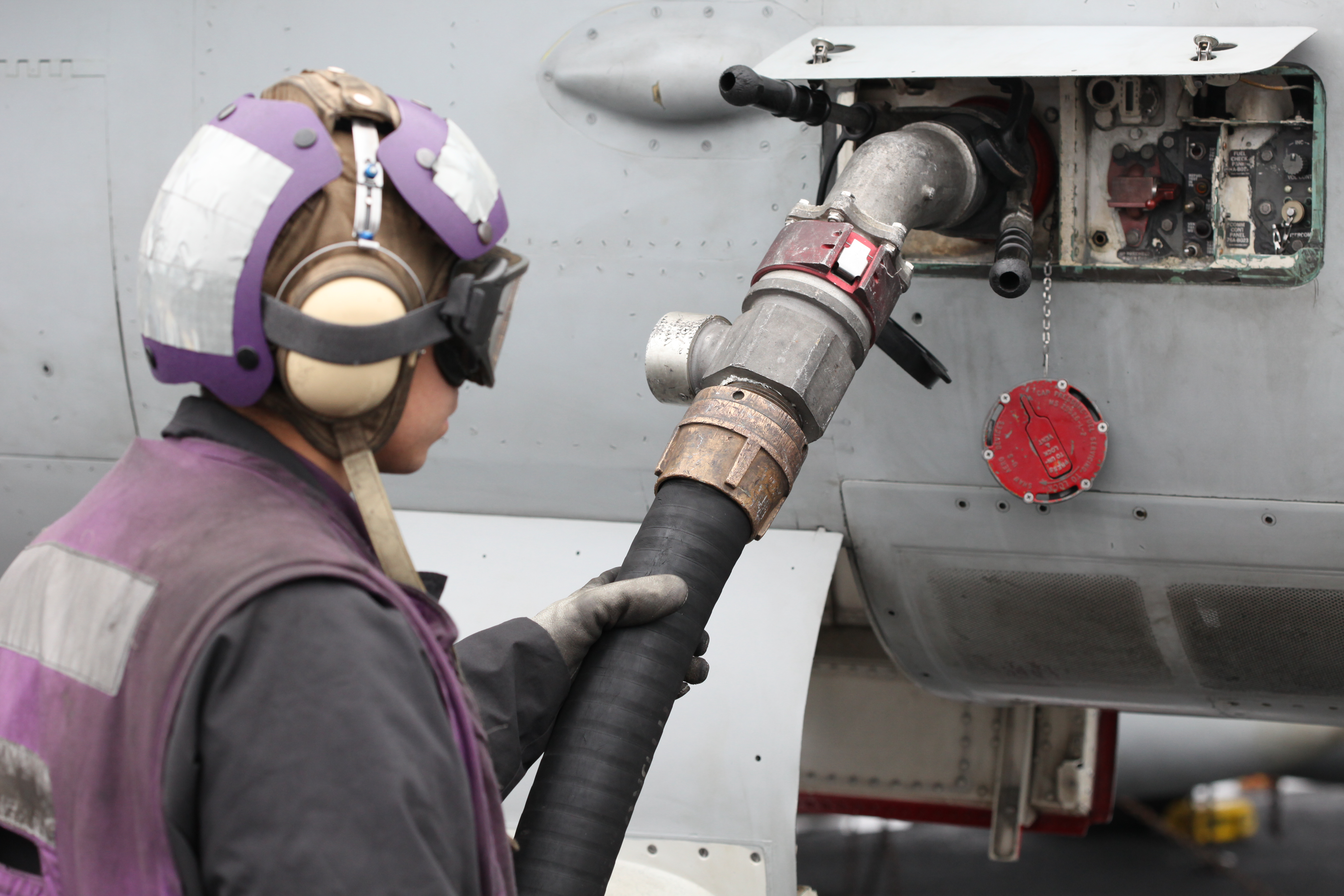 Fueling an F-18